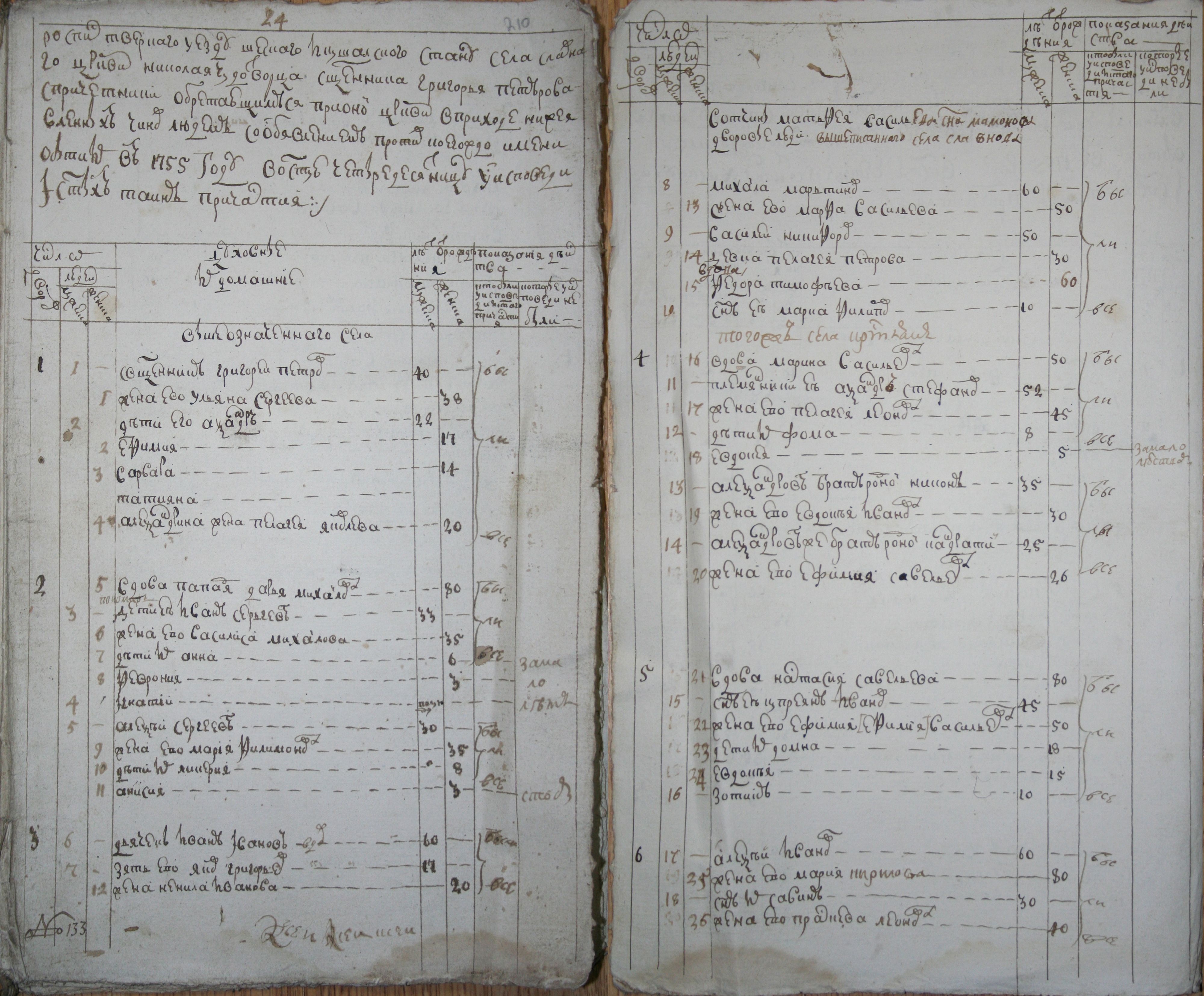 Фрагмент исповедной росписи церкви Николая Чудотворца села Славного Шеского и Кушальского стана Тверского уезда Тверской провинции Новгородской губернии 1755 года